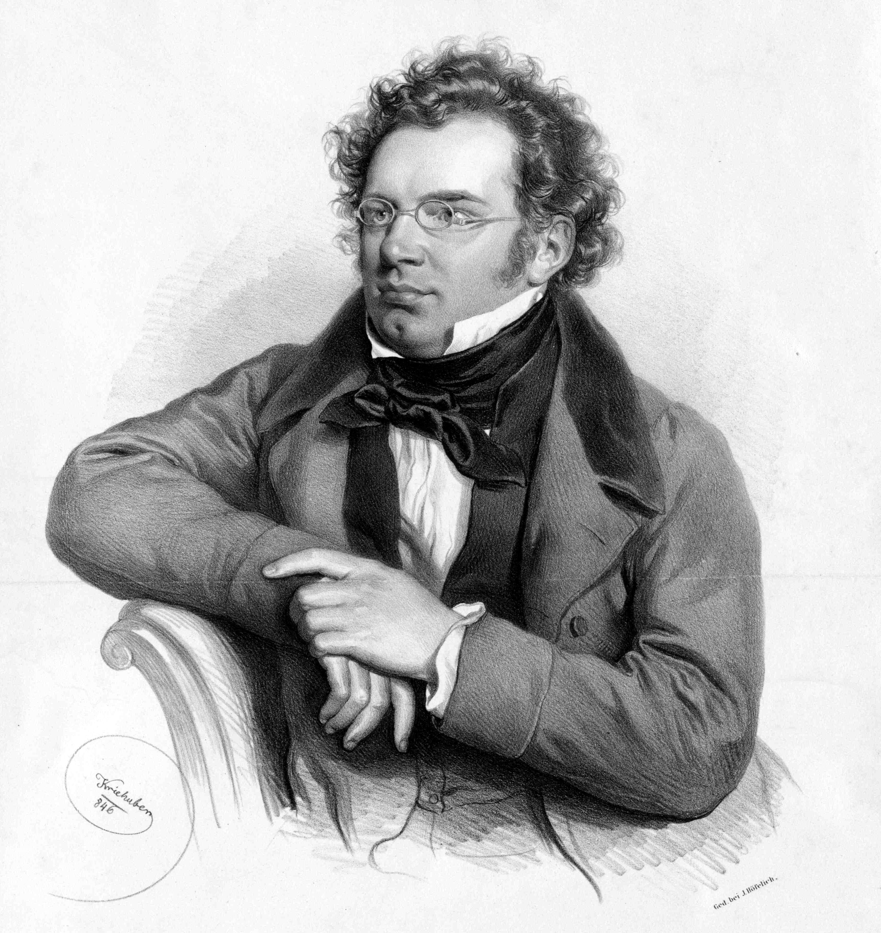 Franz Schubert Lithograph